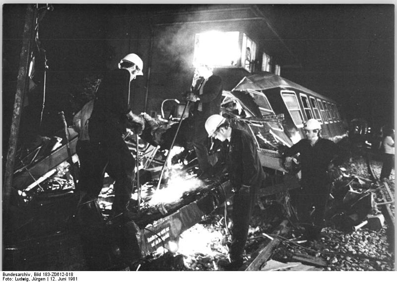 ADN-ZB Ludwig-12.6.1981-hü-Erfurt: Eisenbahnunglück-Im Scheinwerferlicht wurden an der Unglücksstelle in Erfurt-Bischleben die ganze Nacht die Aufräumungsarbeiten fortgesetzt. Mit Schneidbrennern werden hier Waggonteile getrennt. (Handschriftlicher Zusatz: Db gesperrt)